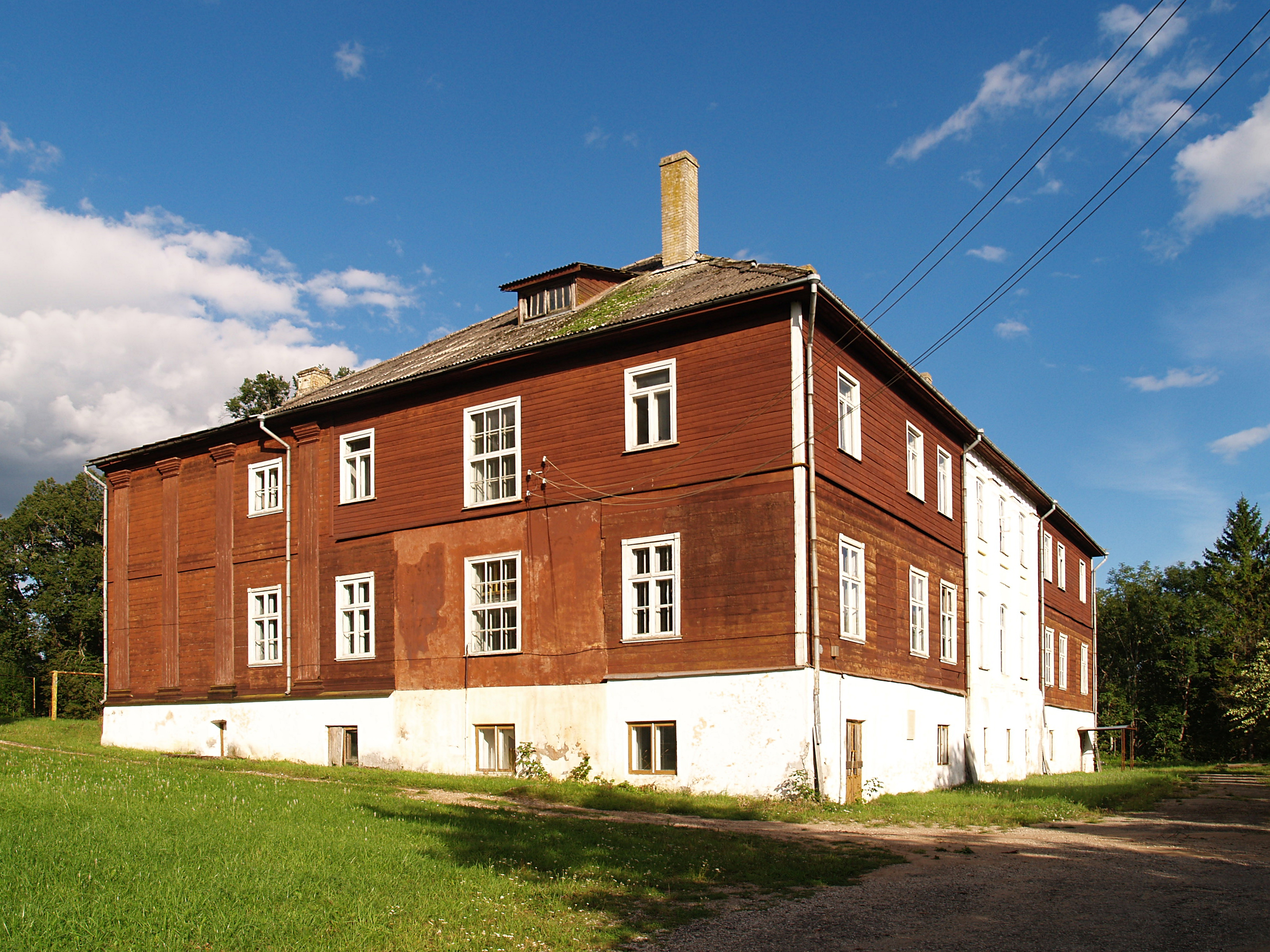 Kuigatsi mõisa peahoone.